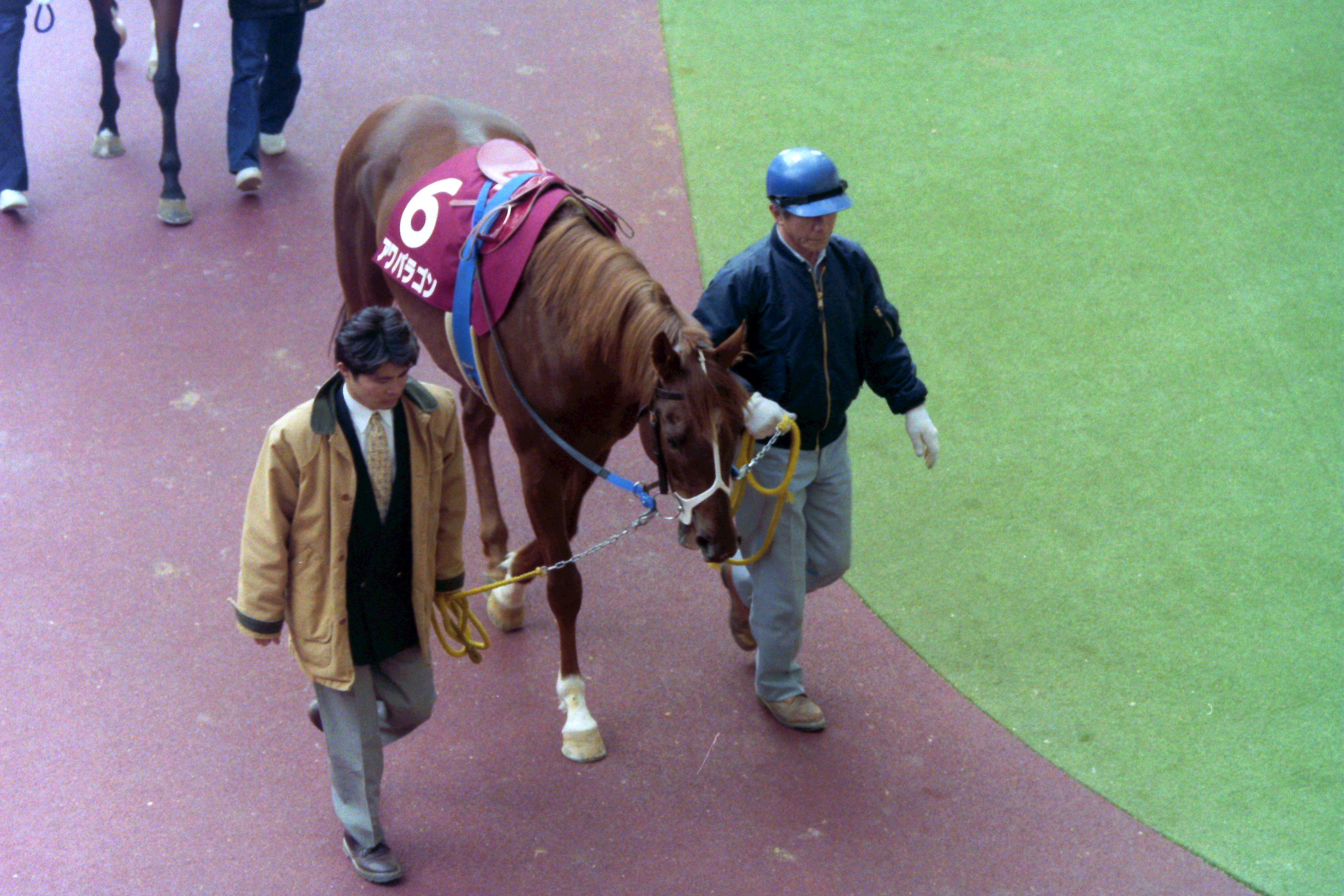 アワパラゴン 1996年3月9日 阪神競馬場